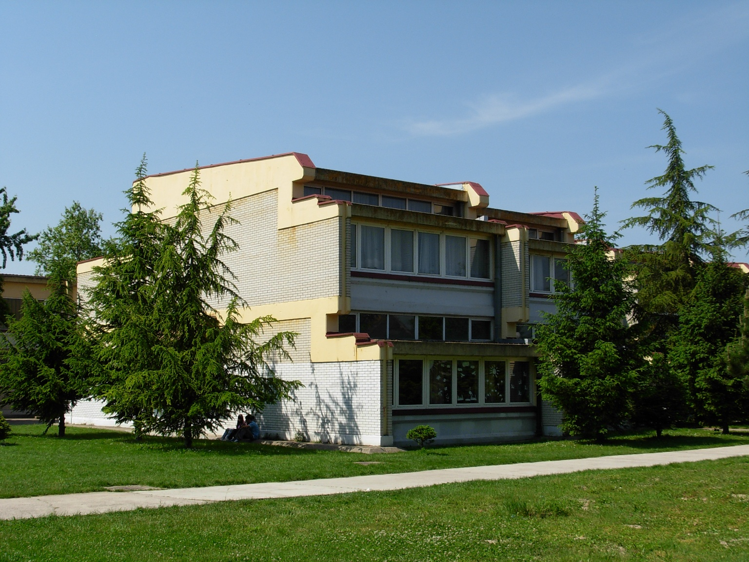 Osnovna škola "Miroslav Antić" u Futogu.